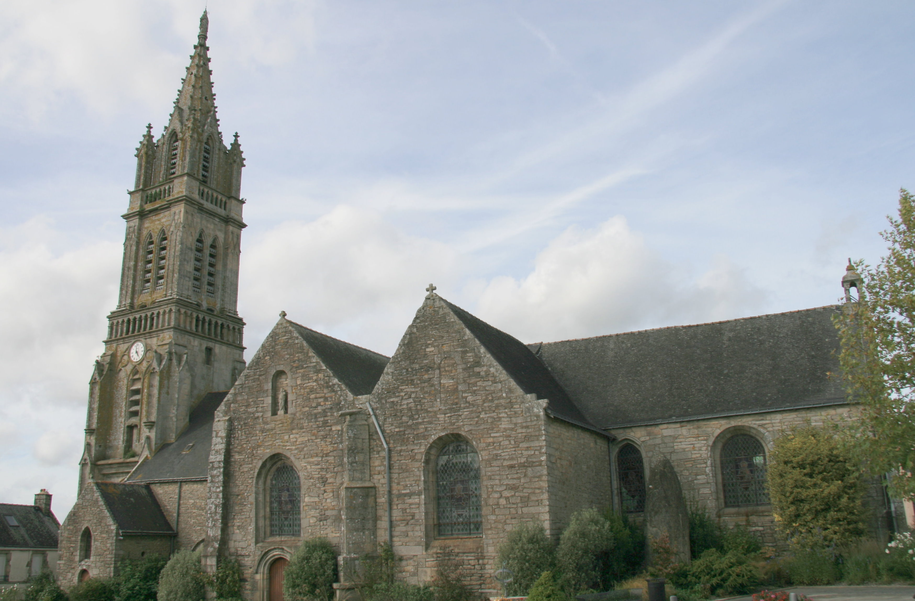 Vue de la façade de l'église Saint-Jean-Brevelay, dans la commune de Saint-Jean-Brevelay, Morbihan